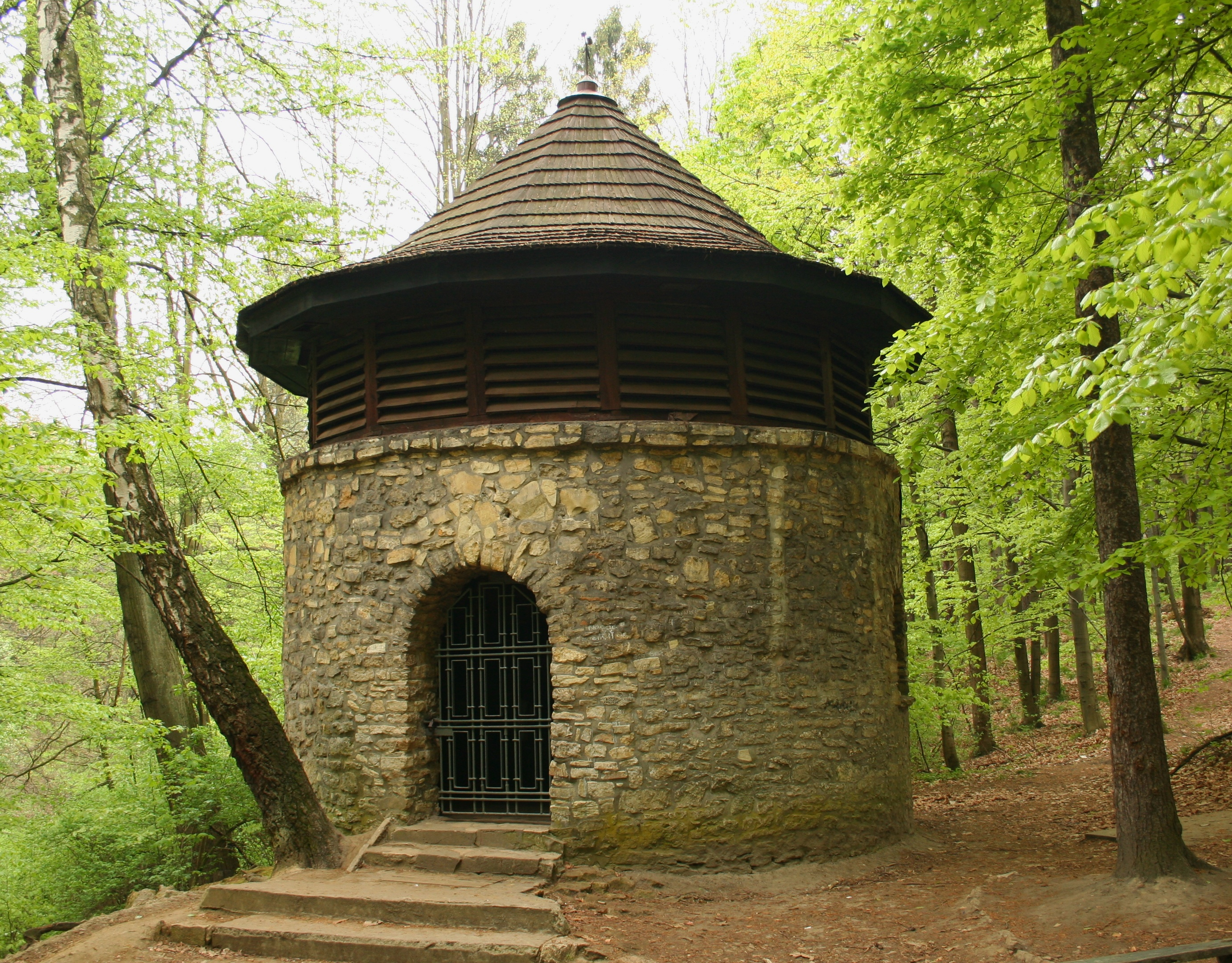 Szyb "Ewa" prowadzący do Sztolni Czarnego Pstrąga w Parku w Reptach (Tarnowskie Góry), Polska, województwo śląskie